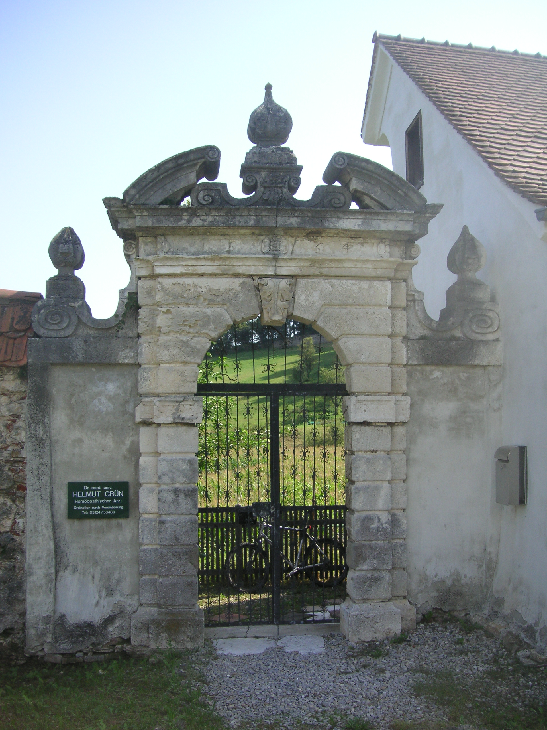 Portal in der nördlichen Aussenmauer des Stiftes Rein